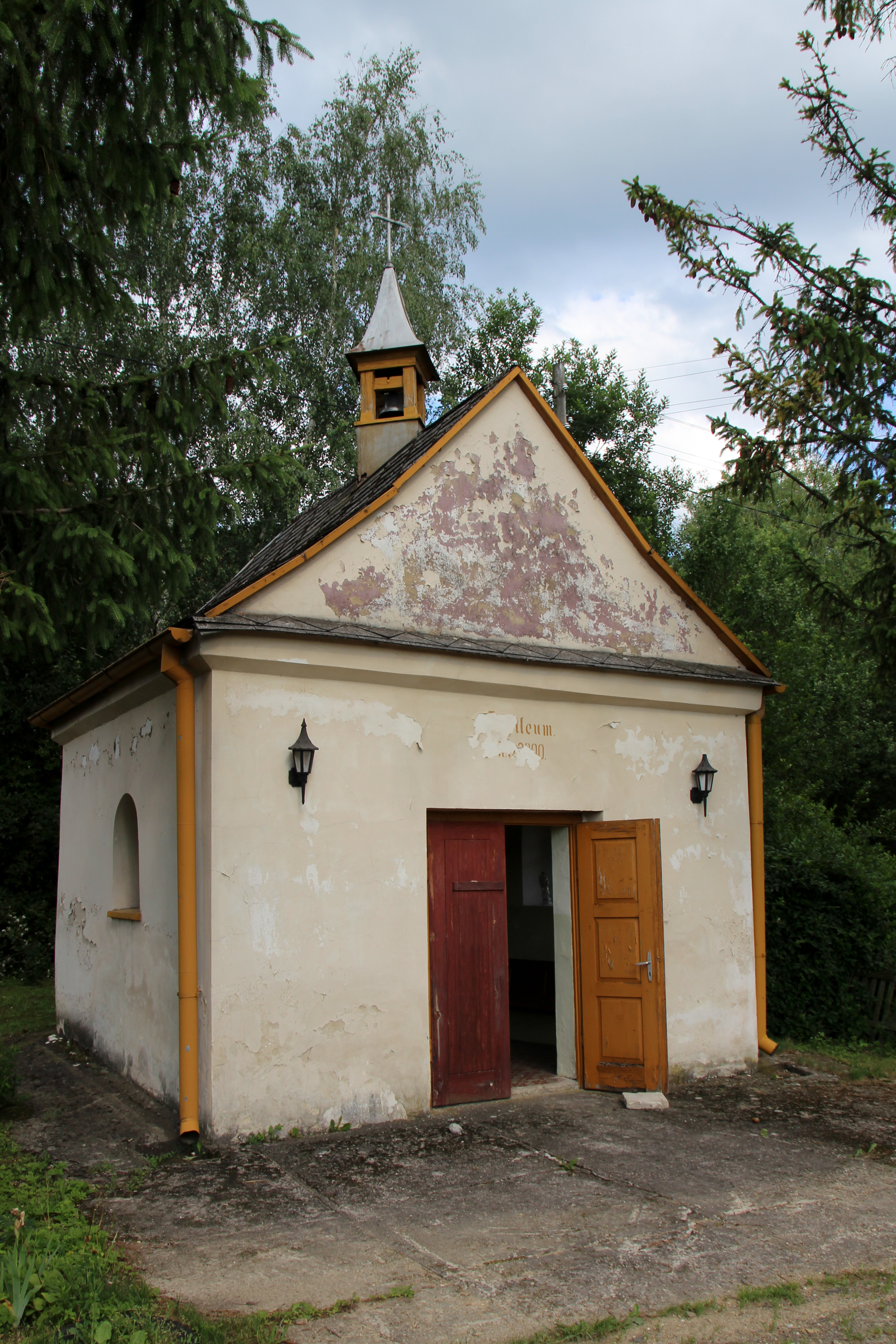 Kaplica świętego Tymoteusza i Aurelii w Wieszczynie -przysiółek wsi Dębowiec w Polsce w województwie opolskim, w powiecie prudnickim w gminie Prudnik.